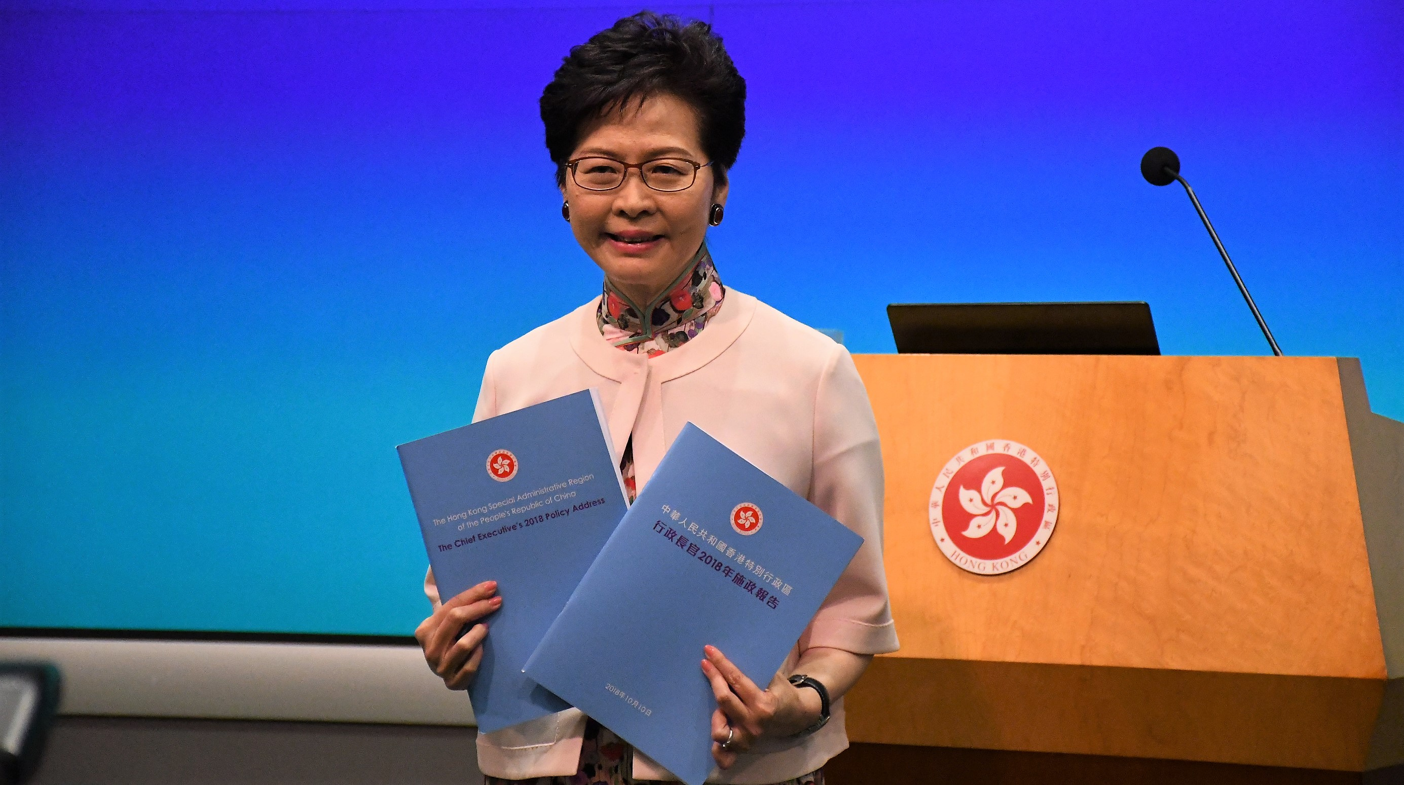 香港特首林鄭月娥發表任內第二份施政報告。(美國之音特約記者 湯惠芸拍攝 )